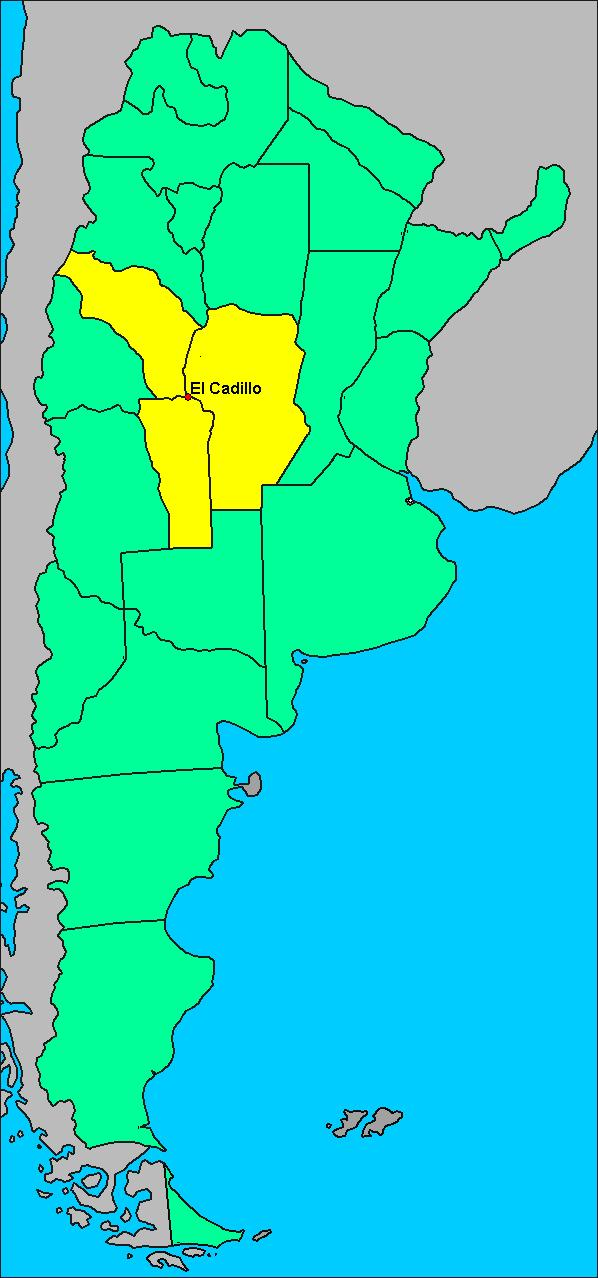 mapa ubicacion el cadillo pueblo en el limite de las provincias argentinas de La Rioja, Cordoba y San Luis. Esta carta transgrede la ley argentina de la Carta que obliga a colocar el área antártica e islas del Atlántico Sur